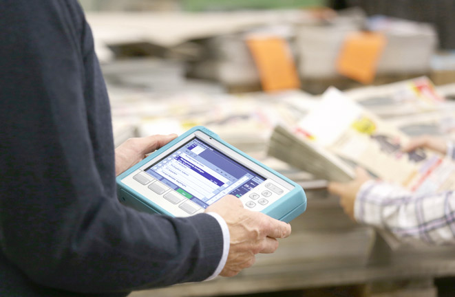 Beispiel für die Durchführung von Zeit- und Ablaufstudien nach REFA-Standards, hier mit dem Gerät REFA-Chronos